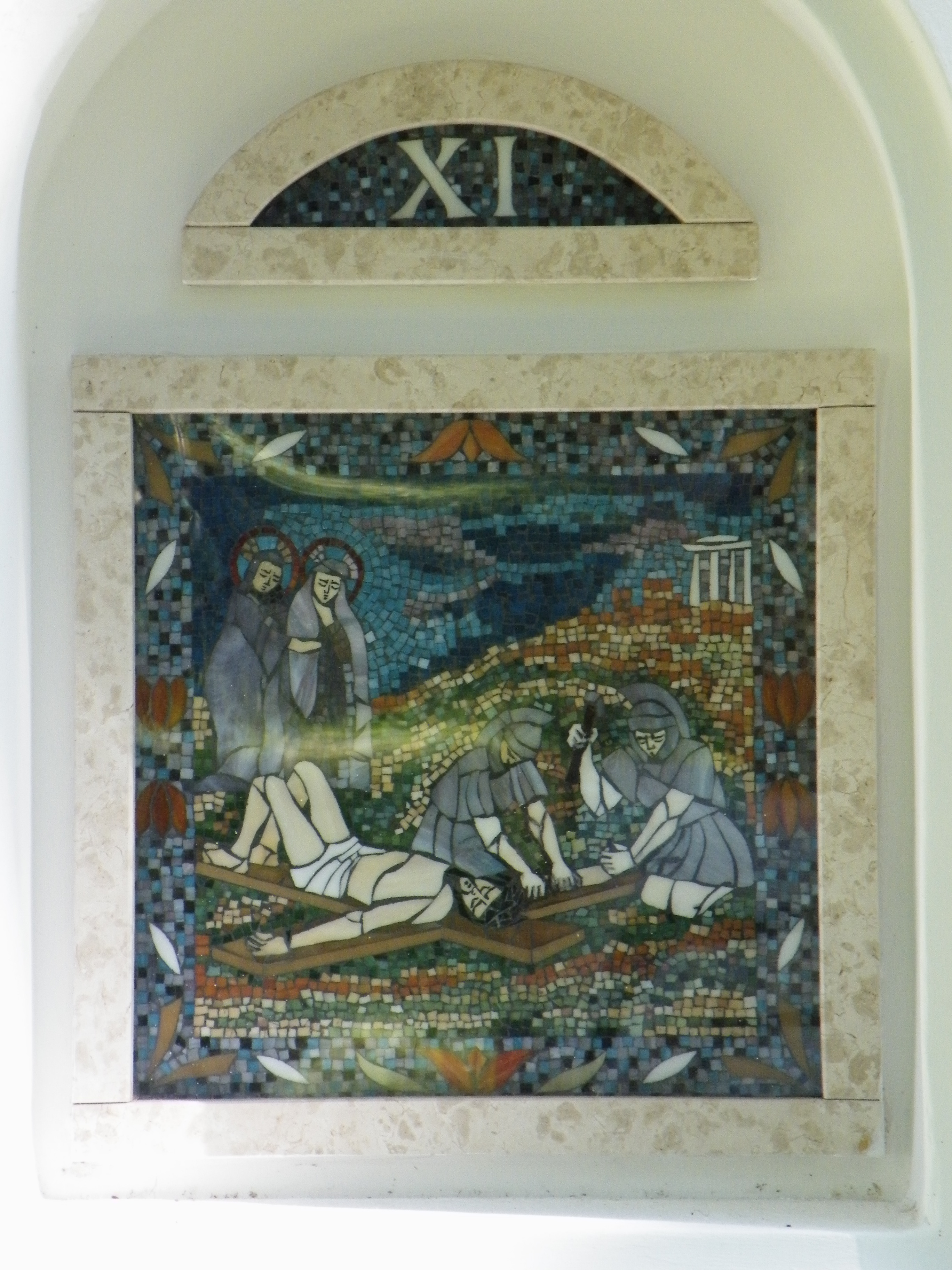 Stációk a Palóc ligetben, Balassagyarmaton